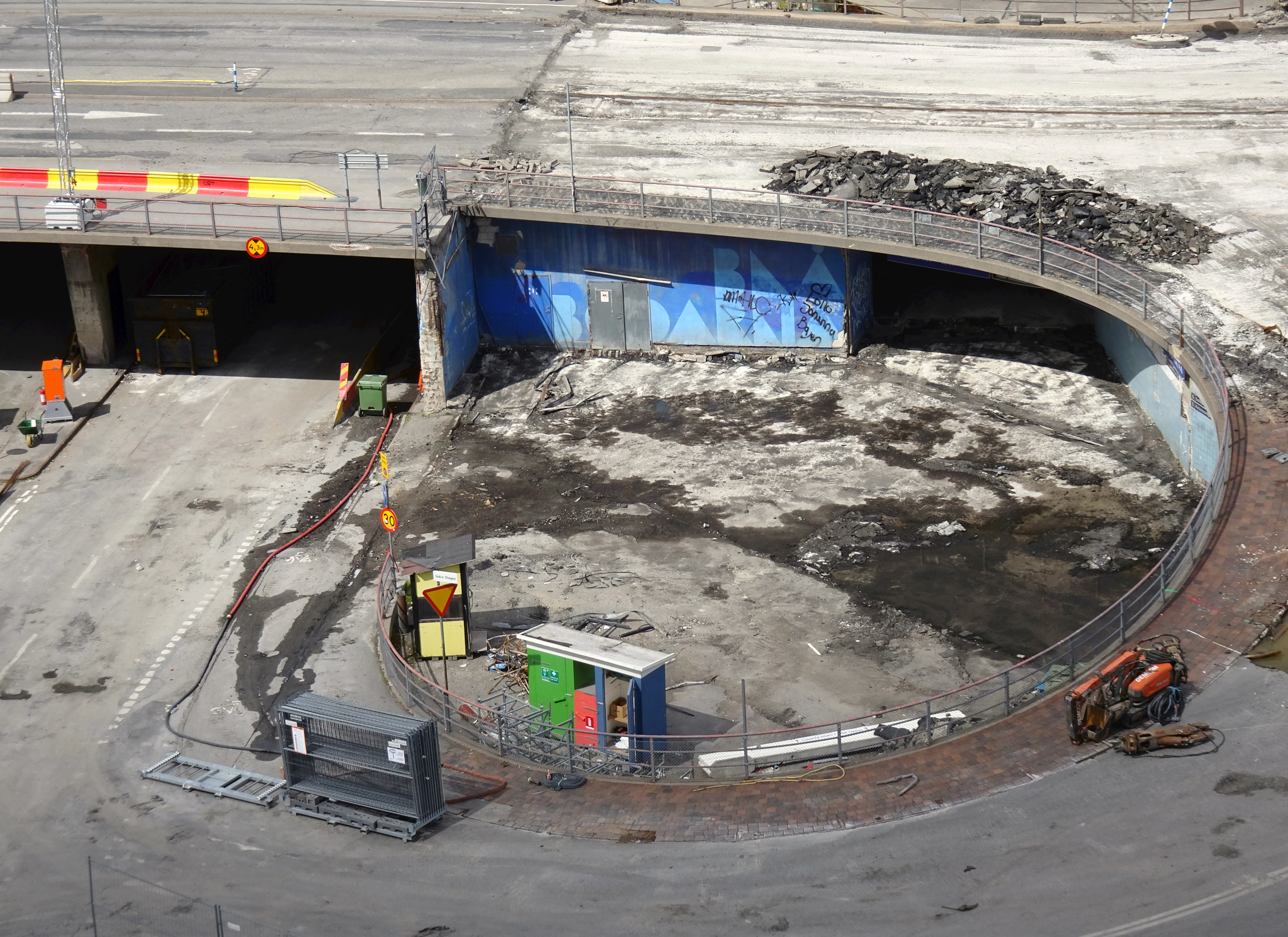 Blå bodarna